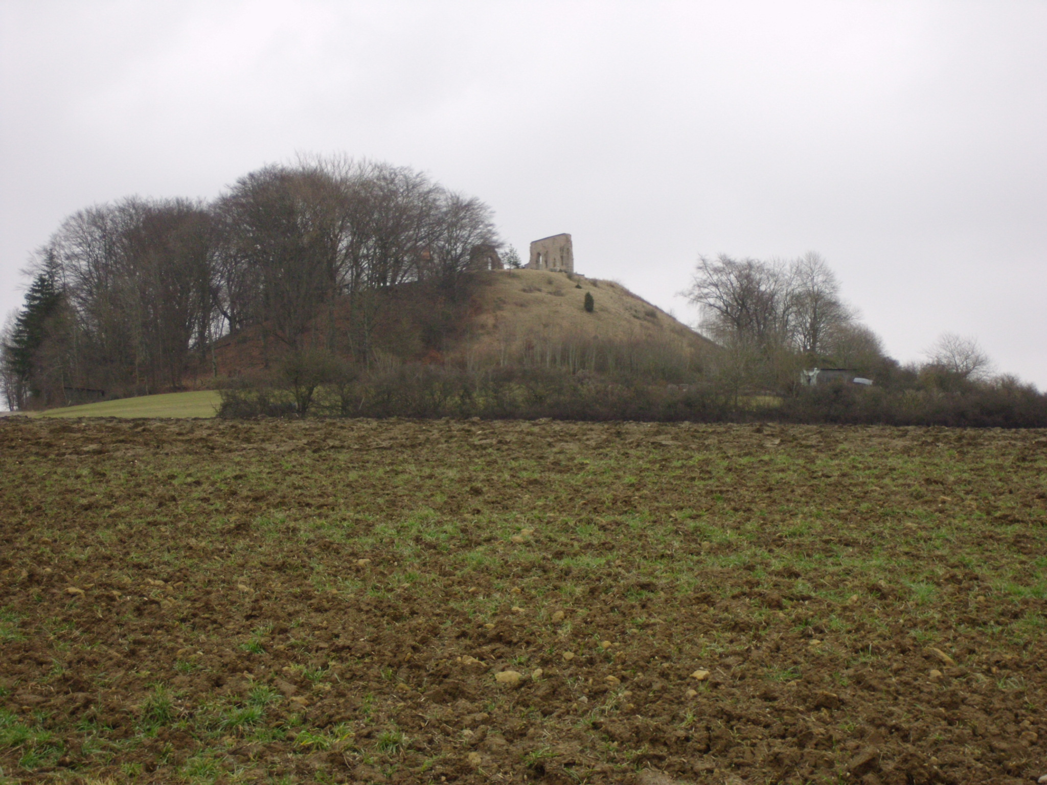 Hechlingen am See, Landkreis Weißenburg-Gunzenhausen (Bayern), Ruine der Katharinenkapelle auf dem Kappellbuck